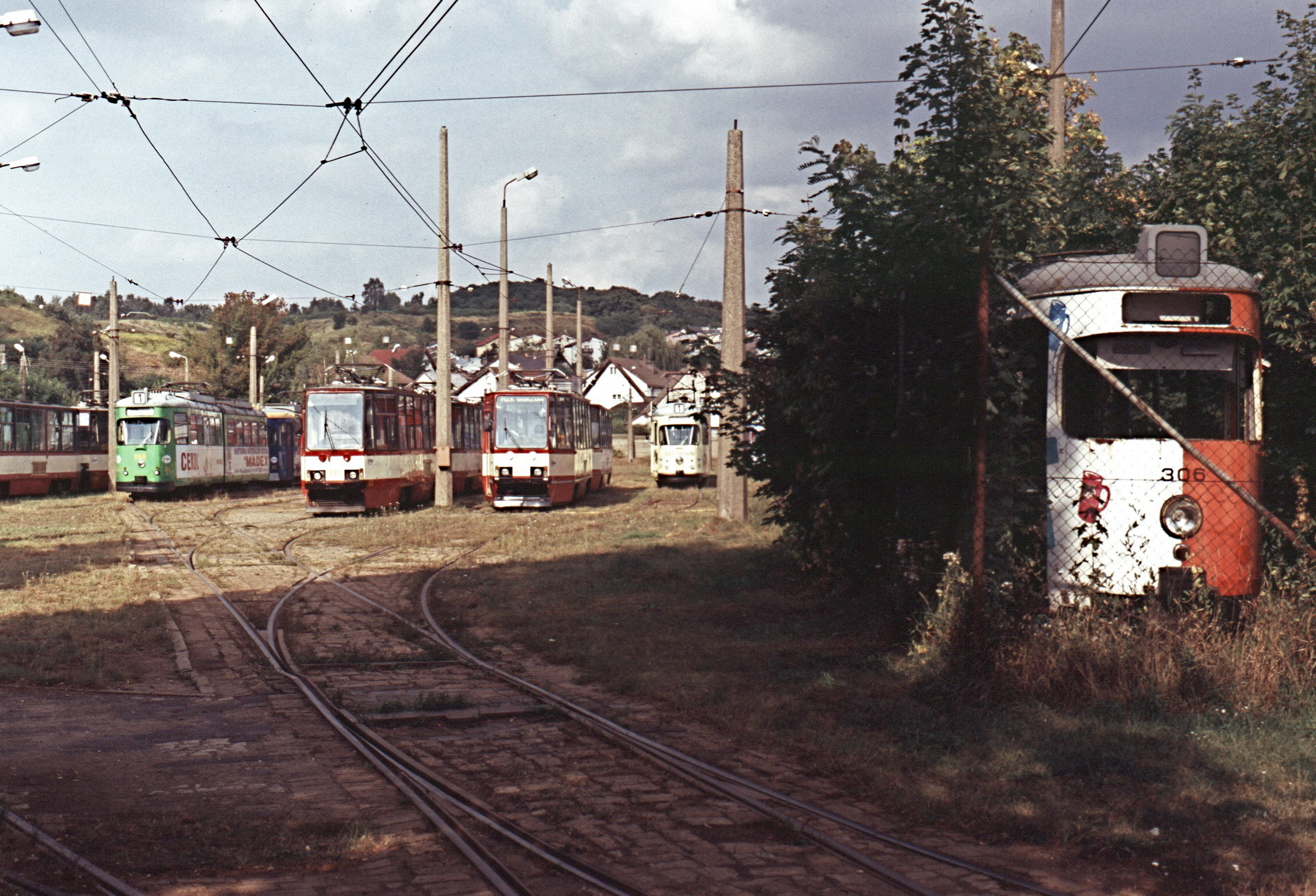 Straßenbahnbetriebshof in Gorzów Wielkopolski